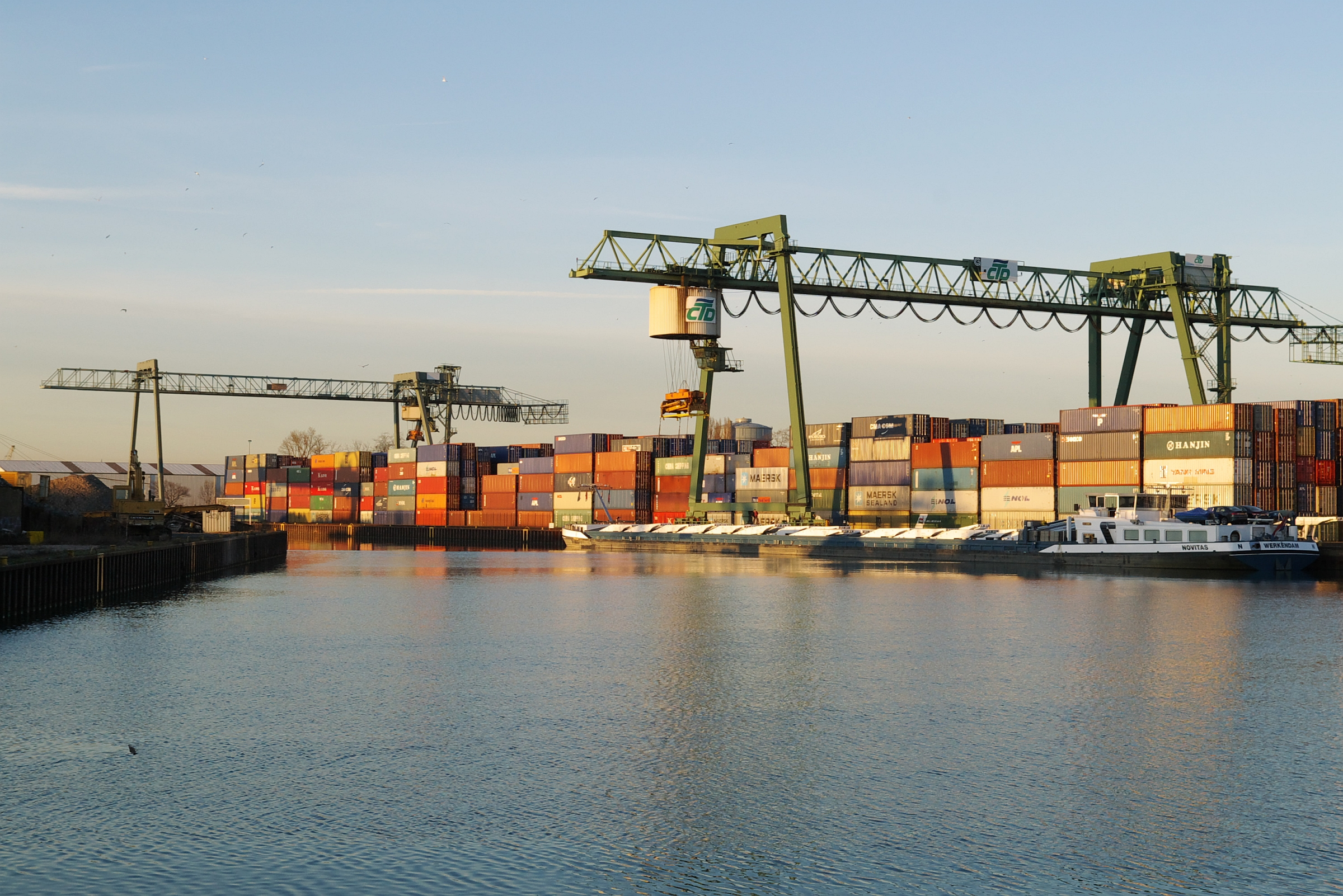 Containerhafen Dortmund